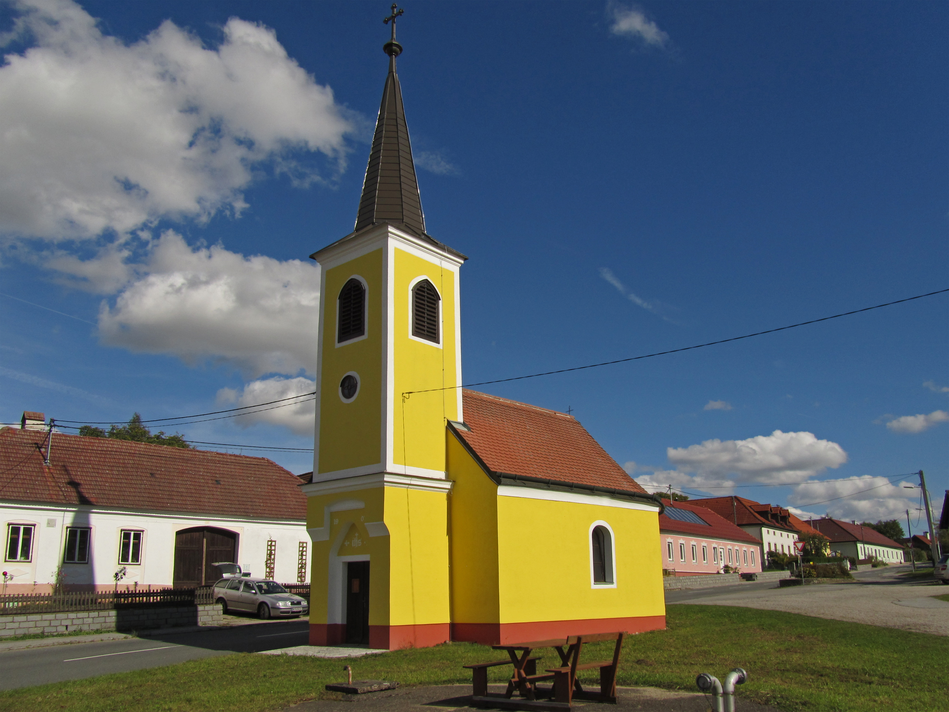 Schlichter Rechteckbau mit Rundschluss von 1834.